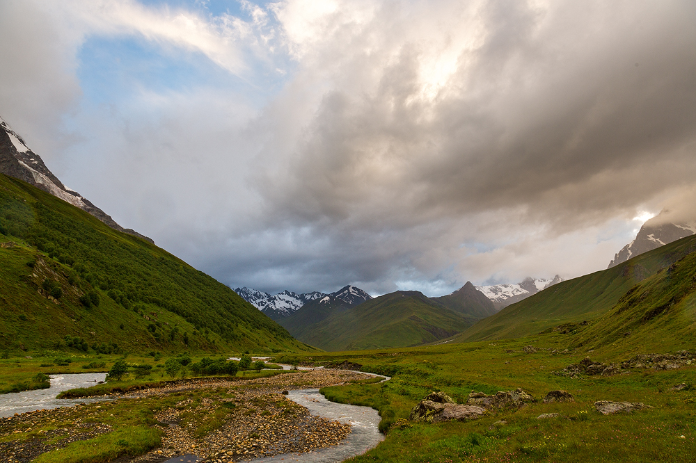 Сфагнумное болото Чифандзар, Ирафский район This image is related to the protected area of Russia number 1510258